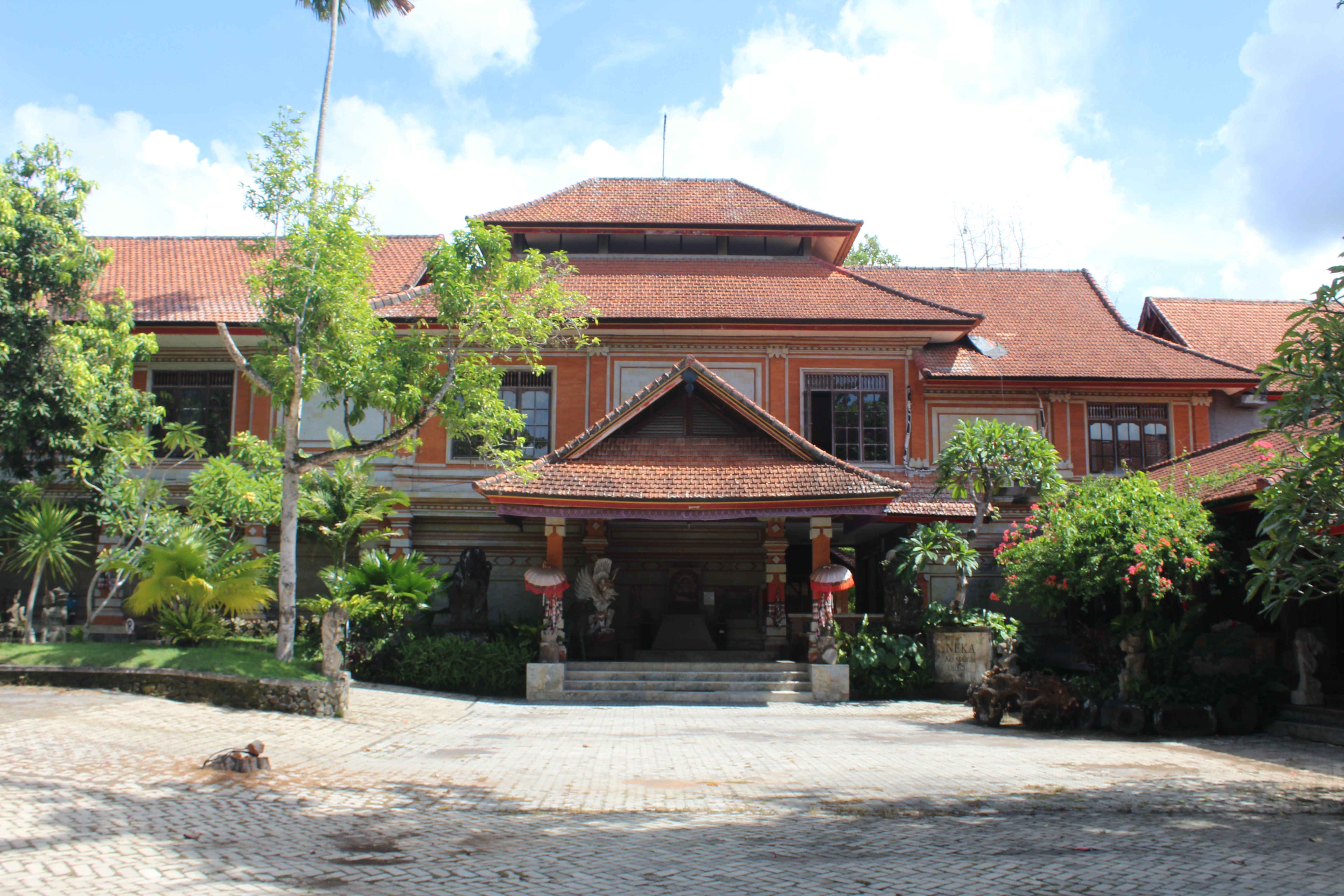 Gedung dan pintu masuk Museum Seni Neka di Ubud, Bali